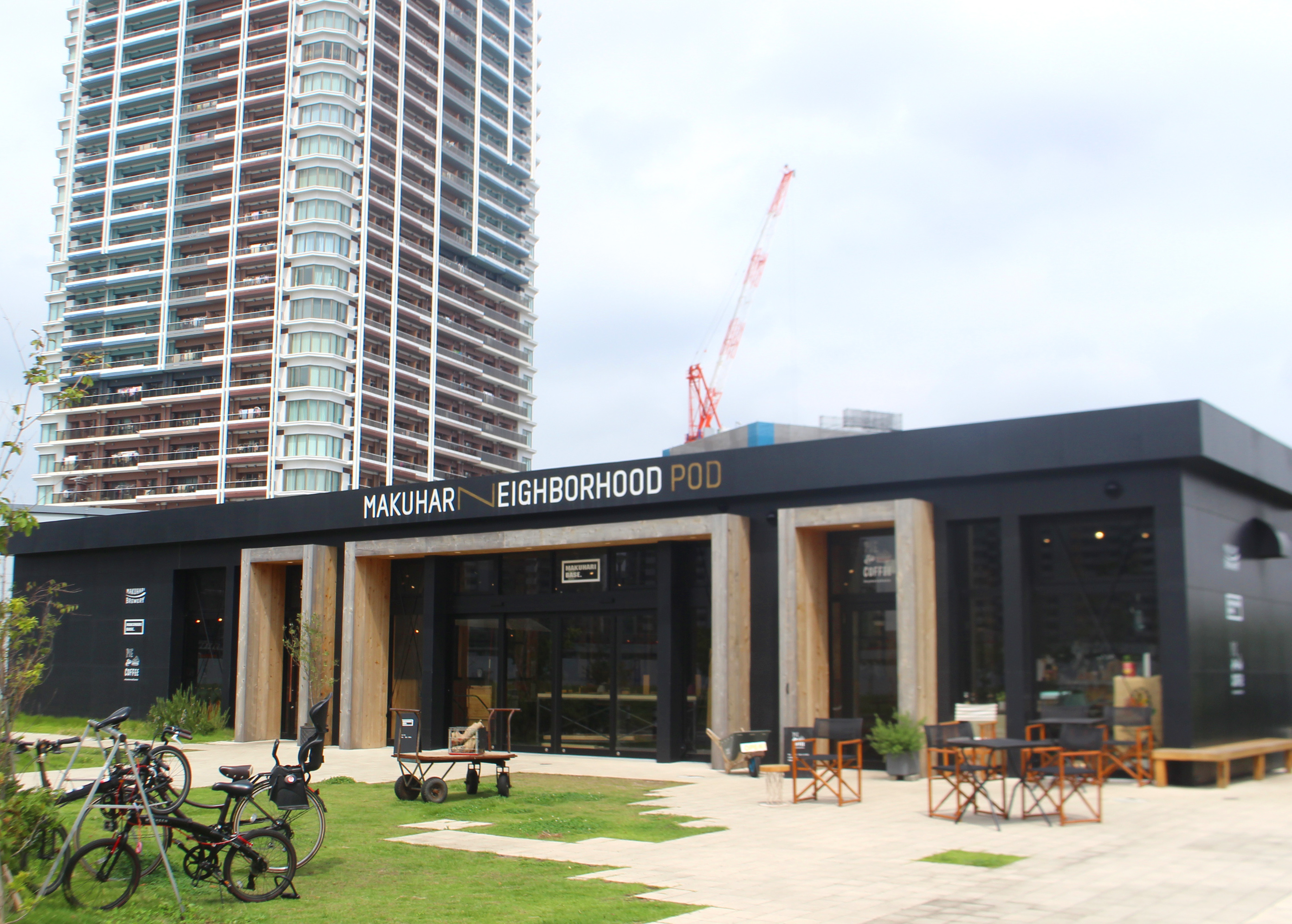 Makuhari Neighborhood Pod 幕張ネイバーフッド